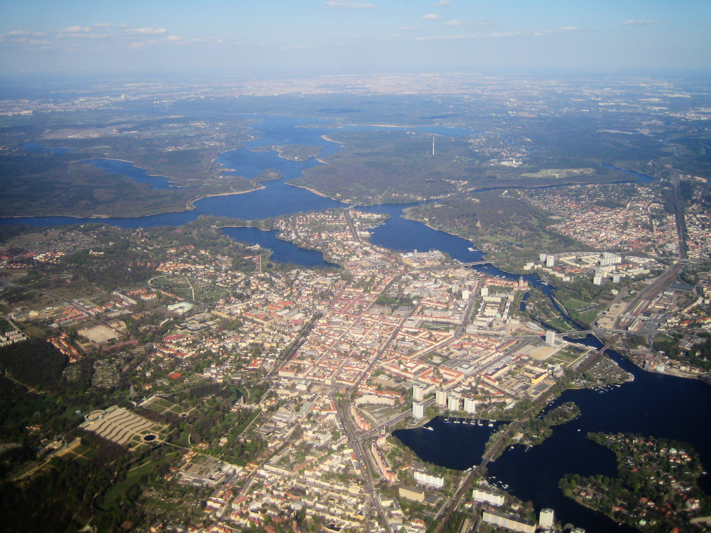 Potsdam (Sanssouci!) und hinten Berlin